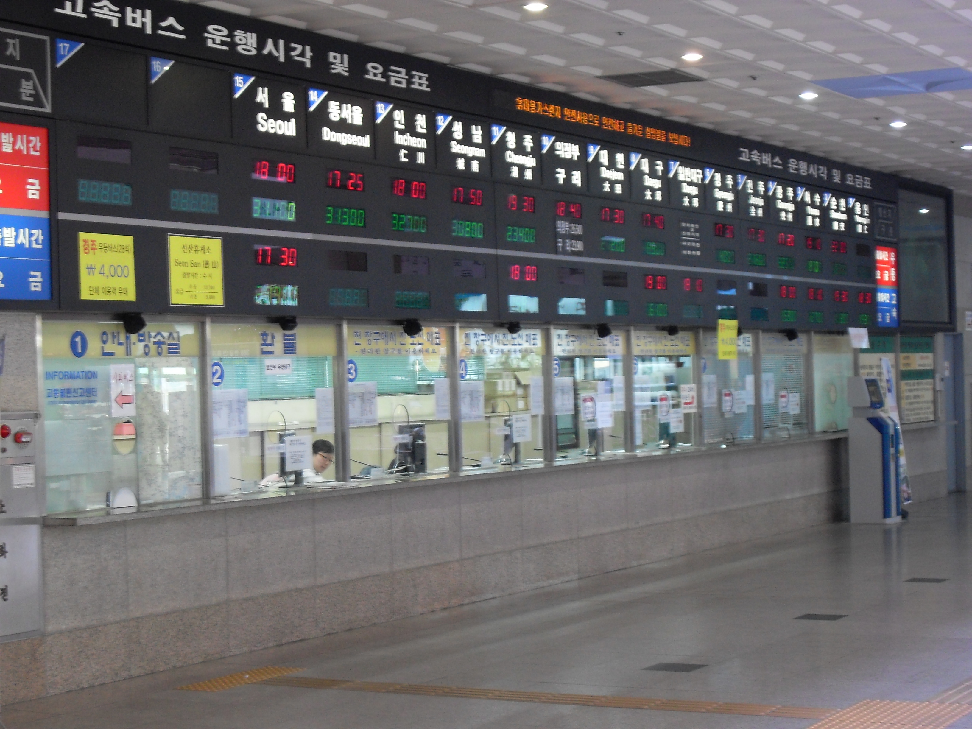 부산 종합버스터미널 매표소